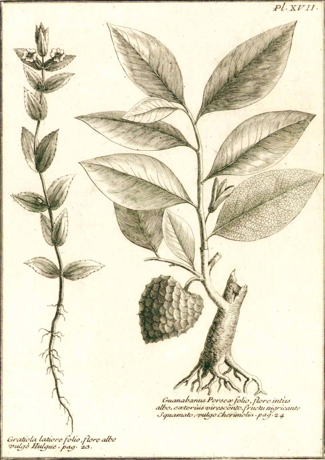 A droite de la planche "Annona cherimola". In: "Journal des Observations Physiques, Mathematiques et Botaniques, faites par l'ordre du roy sur les côtes orientales de l'Amérique méridionale & aux Indes occidentales. Et dans un autre voyage fait par le même ordre à la Nouvelle Espagne & aux Isles de l'Amérique. (Paris-1725)" by Louis Feuillee, (1660-1732).